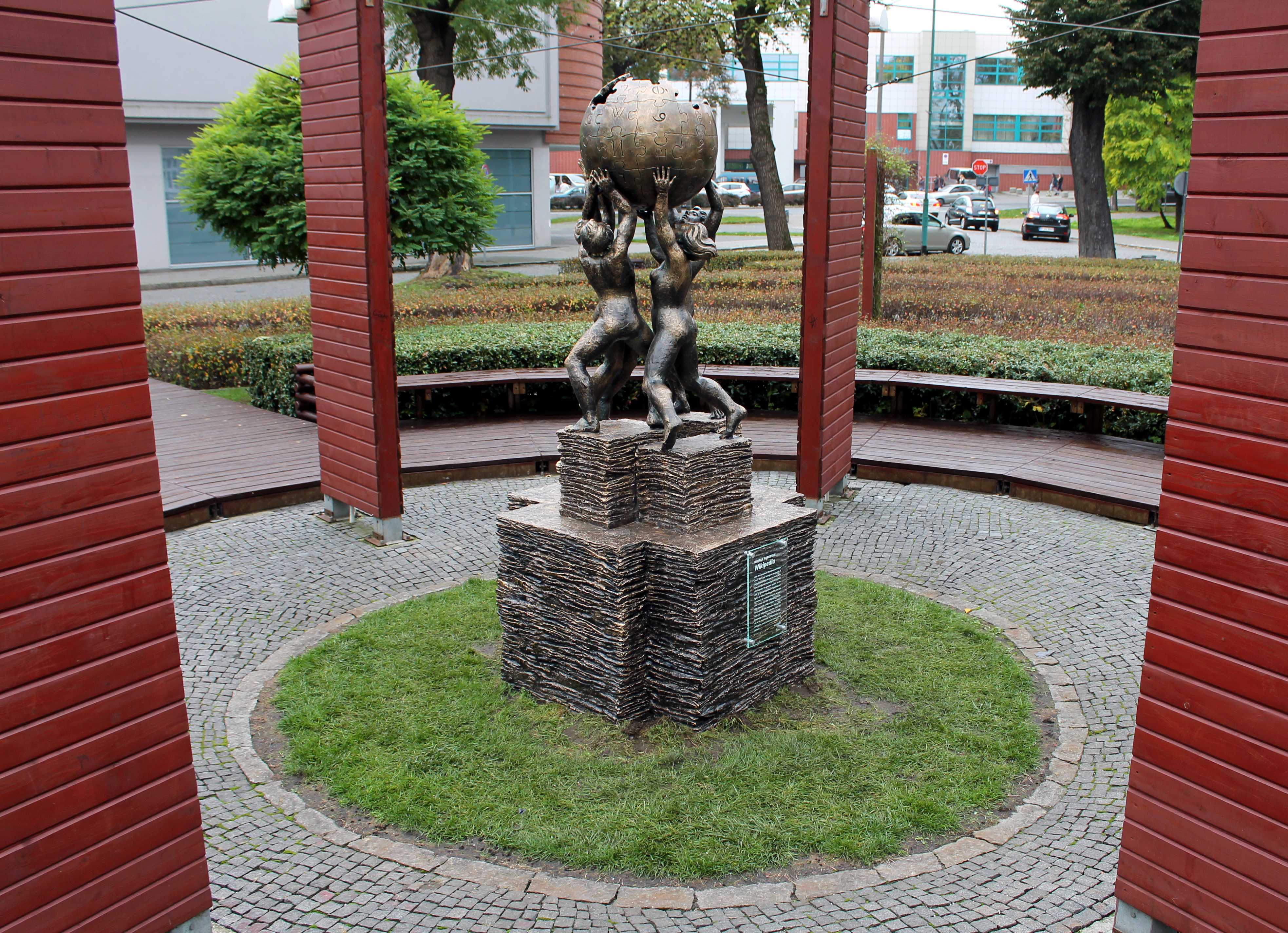 Pomnik Wikipedii